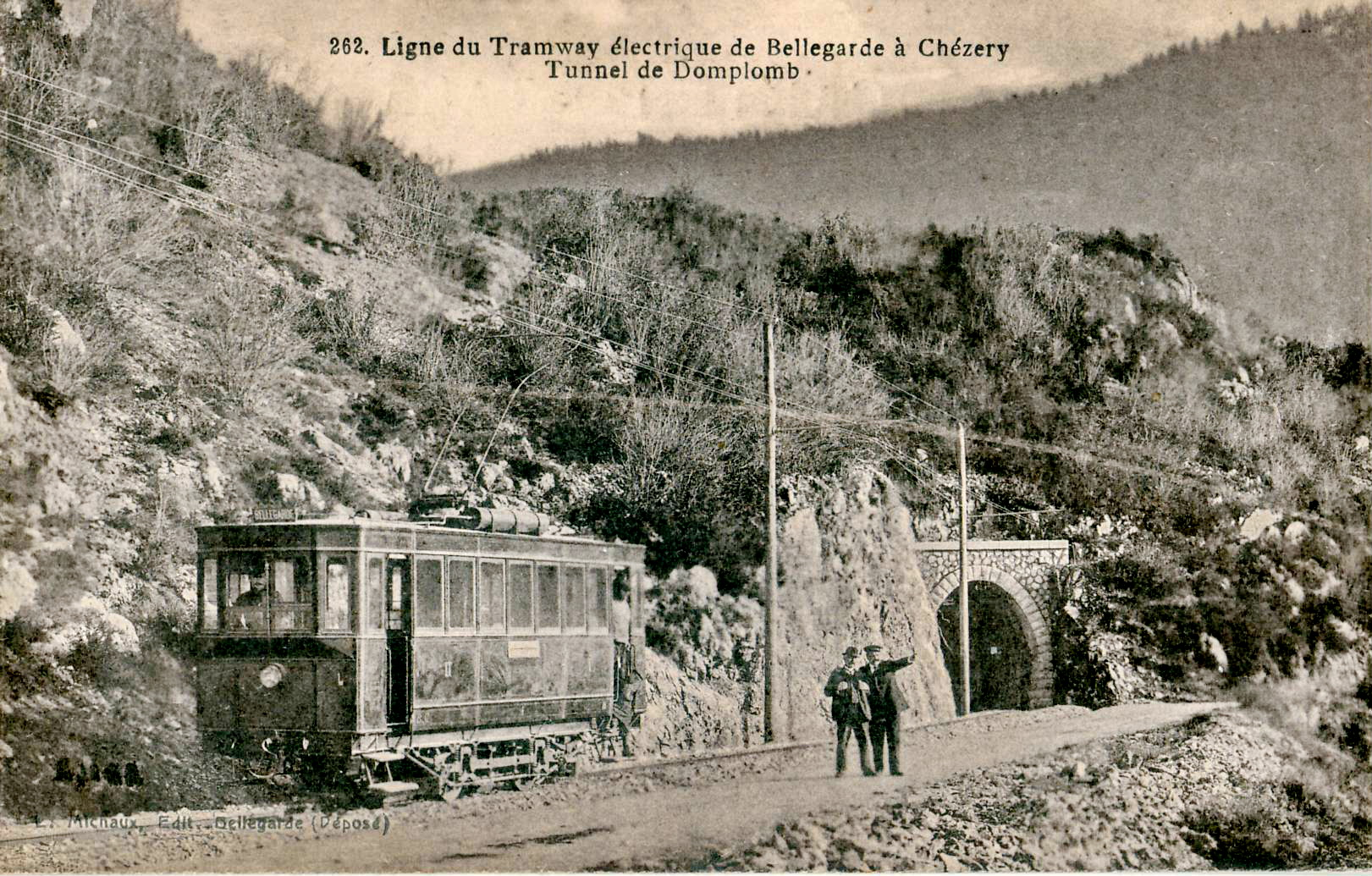 Carte postale ancienne éditée par L. Michaux, éditeur à Bellegarde, n°262Ligne du Tramway électrique de Bellegarde à Chézery - Tunnel de DomblombLe tunnel de Domplomb, d'une longueur de 77 m, se trouve au p.k. 15 de la ligne